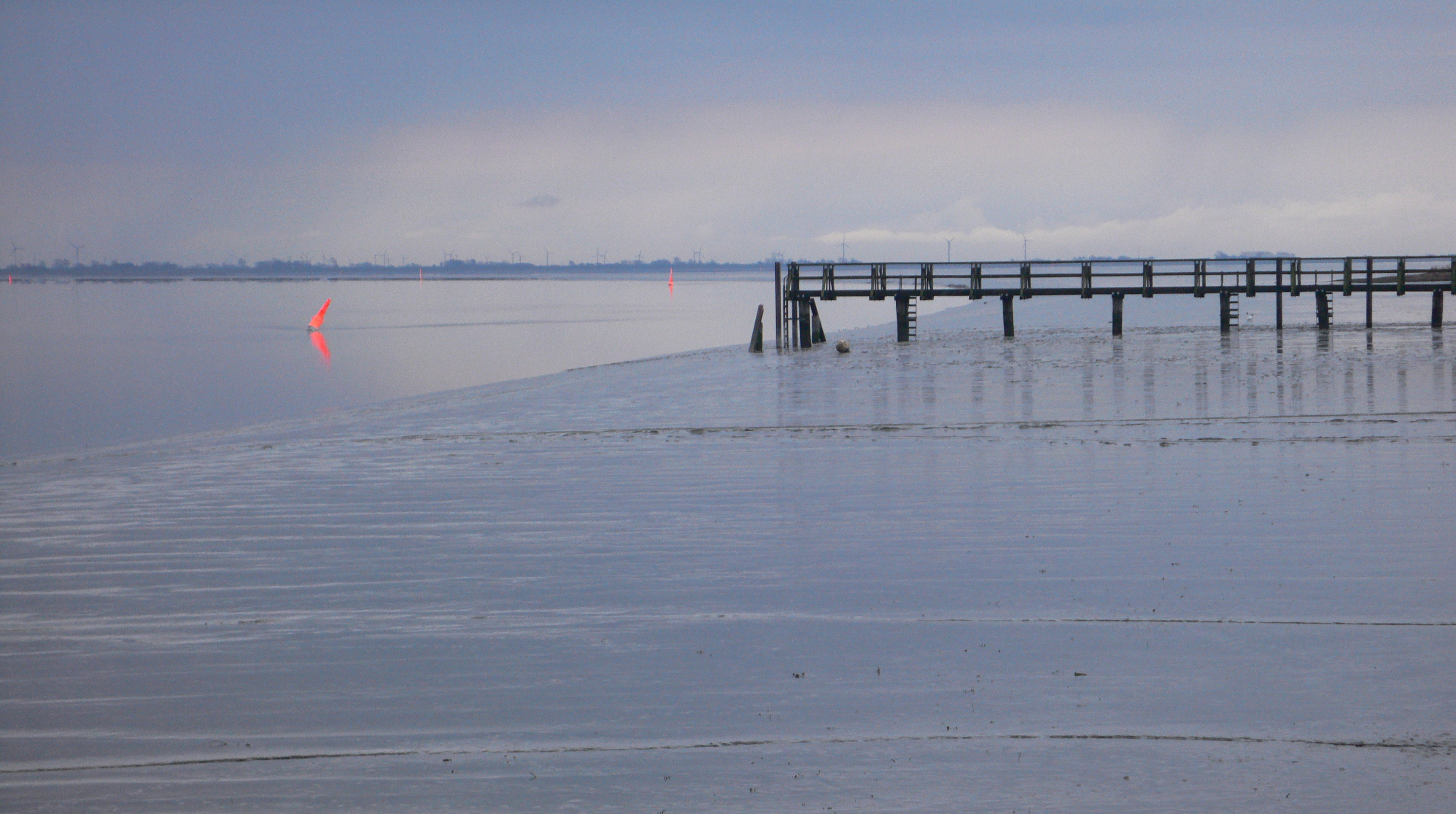 Eiderestuarium bij laagwater, ter hoogte van Tönning